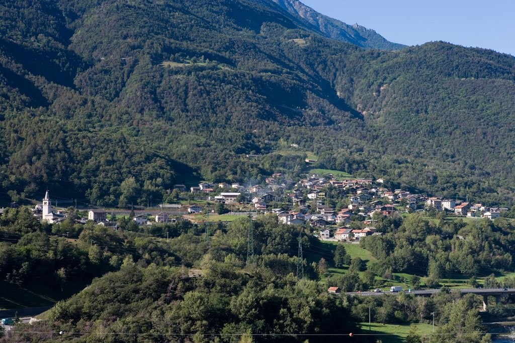 Descrizione di Pontey